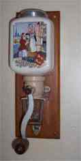 moulin à café mural de la marque Peugeot Frères représentant la province de Normandie